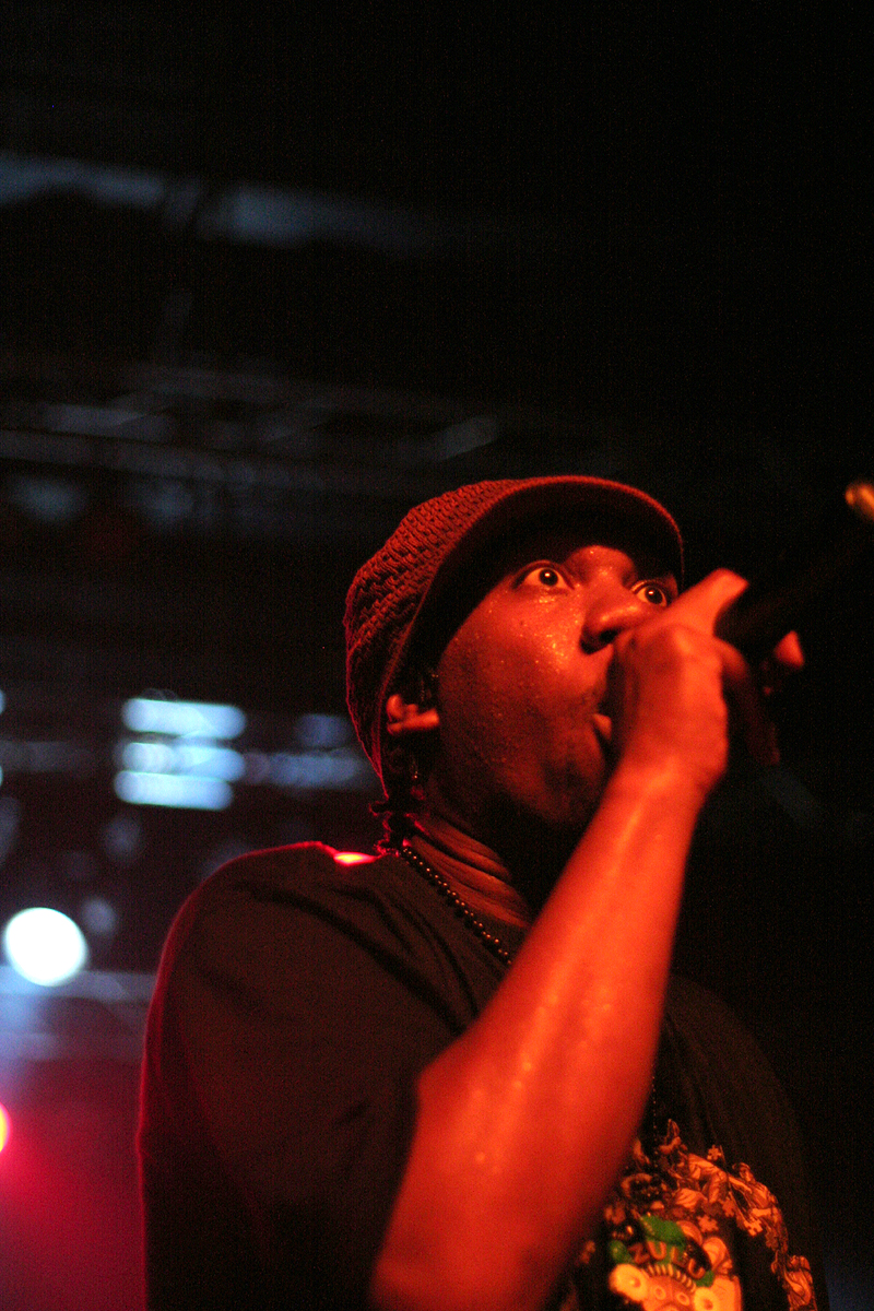 KRS-One performing in Vooruit, Ghent.krs-one